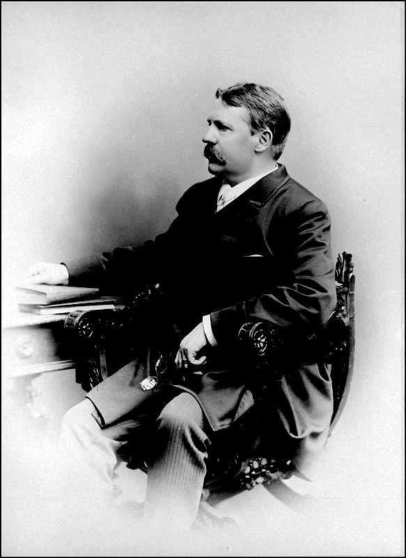 Viktor Rydberg